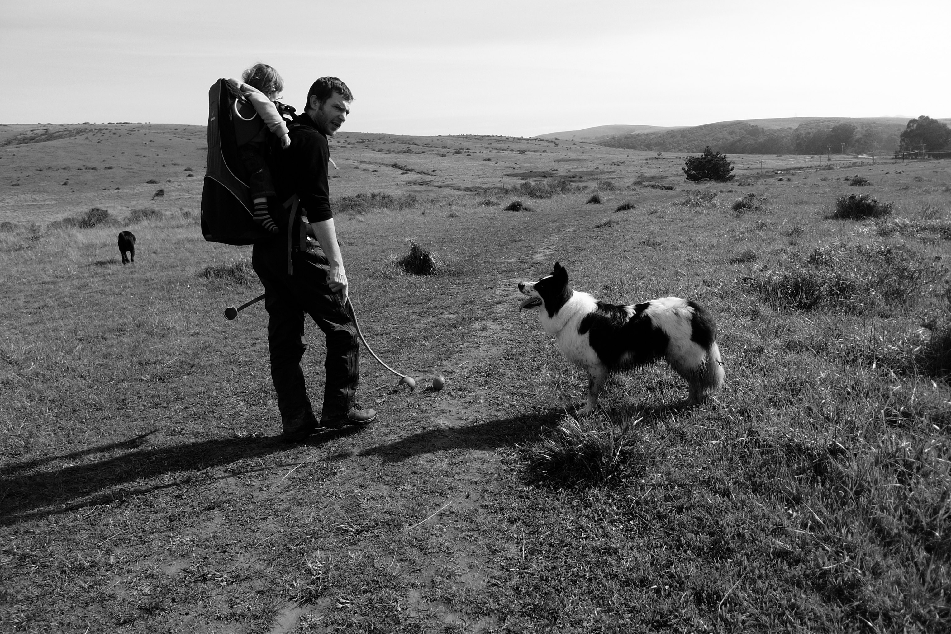 Mann mit zwei Wurfschleudern für Hunde